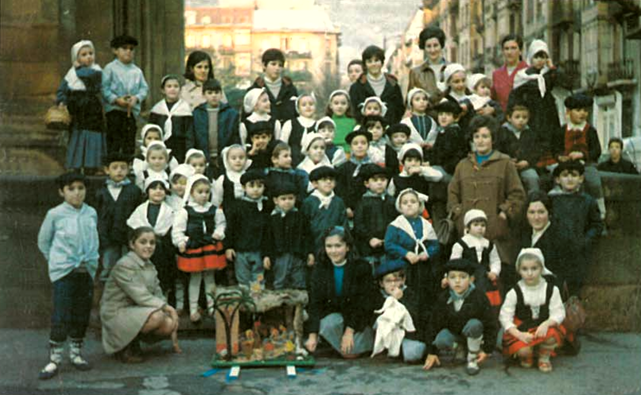 Zurriola ikastolan 1969ko Gabonetan Gros auzoan zehar antolatu zen "Jaiotza", oraindik ez zegoen Olentzero. Hiru andereñoak daude: Beitia, Elola eta Garagorri